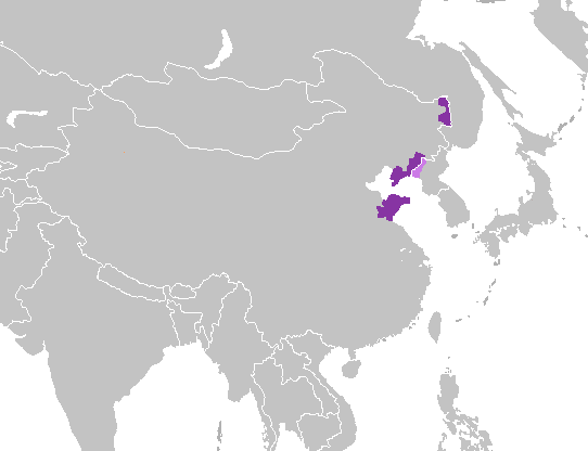 Mayoría de habantes Minorías